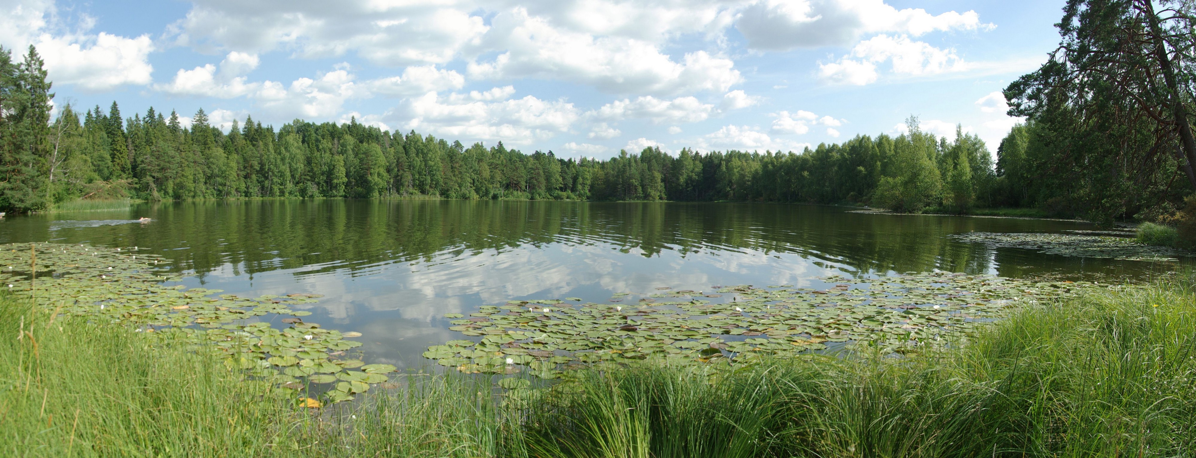 Järv asub Lääne-Virumaal Tapa vallas